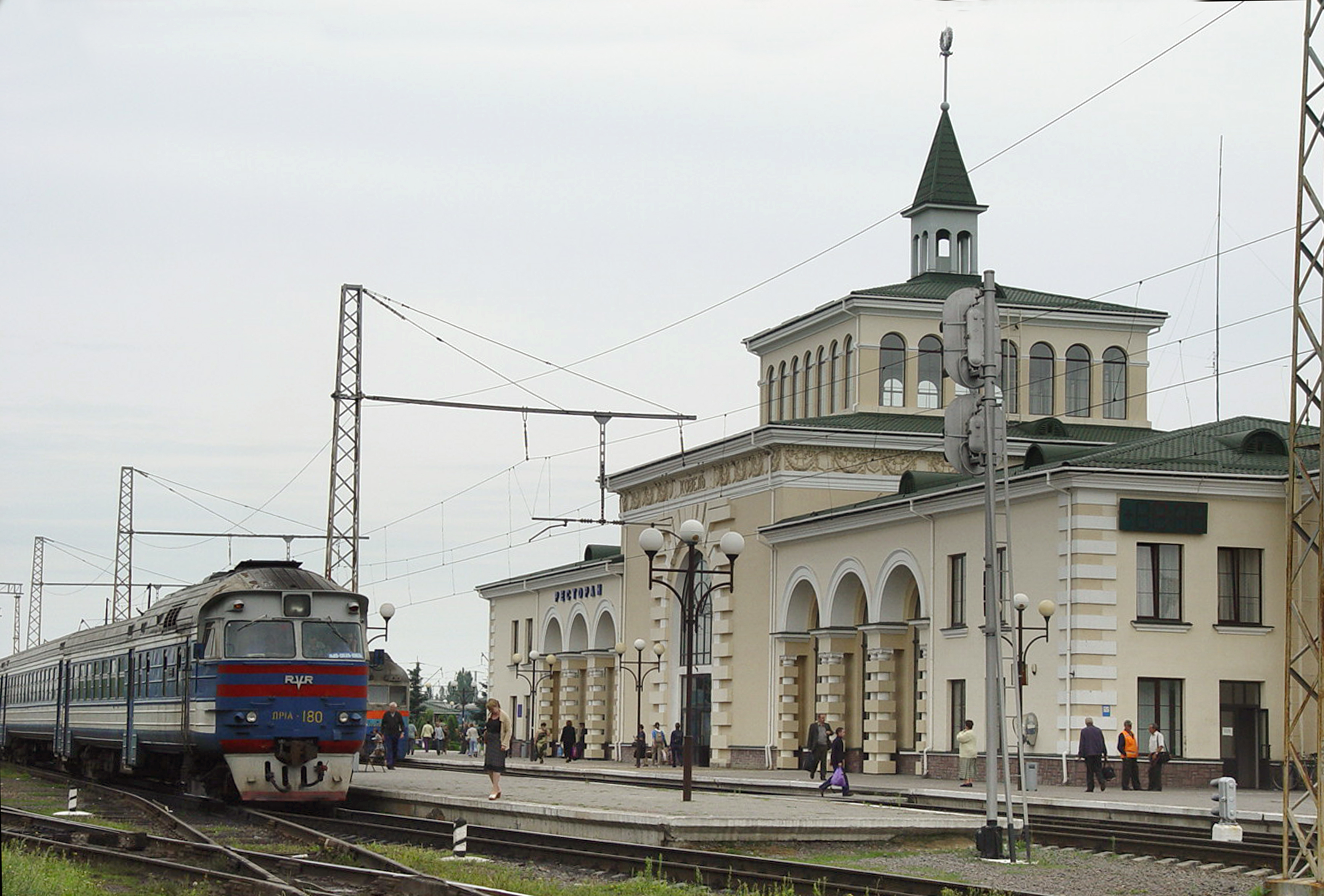 Залізничний вокзал (мур.), Ковель